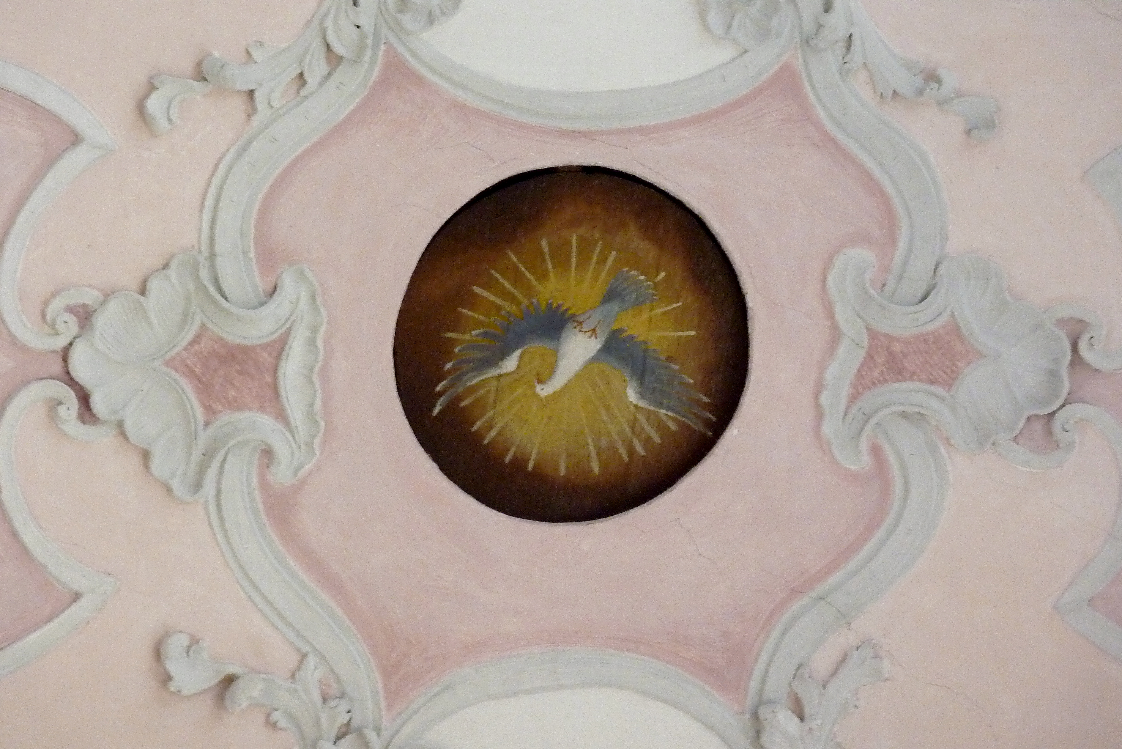 Katholische Pfarr- und Wallfahrtskirche Mariä Schmerzen in Waldkirch, einem Ortsteil von Winterbach (Schwaben) im Landkreis Günzburg (Bayern), Stuck von 1745 von Joseph Dossenberger; Heilig-Geist-Loch